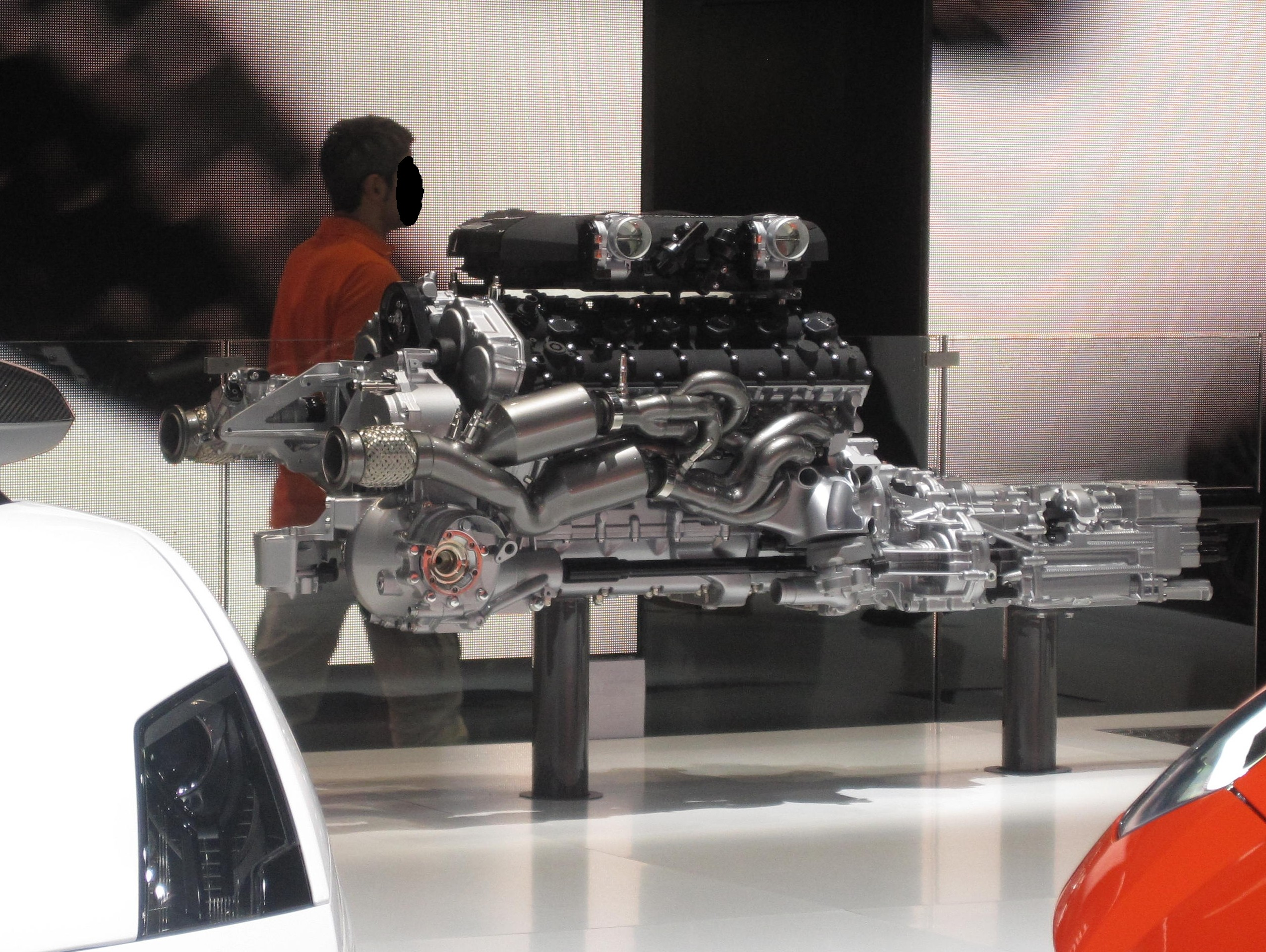 Motore di una Lamborghini Aventador, 81° auto salone di Ginevra 2011